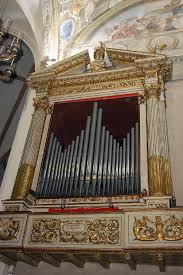 Facciata dell'organo a canne meccanico Bossi-Urbani 1860 della Basilica di Santa Maria delle Grazie a Cortemaggiore (PC)